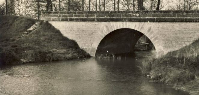 Pont et rivière à Nouans-les-Fontaines.